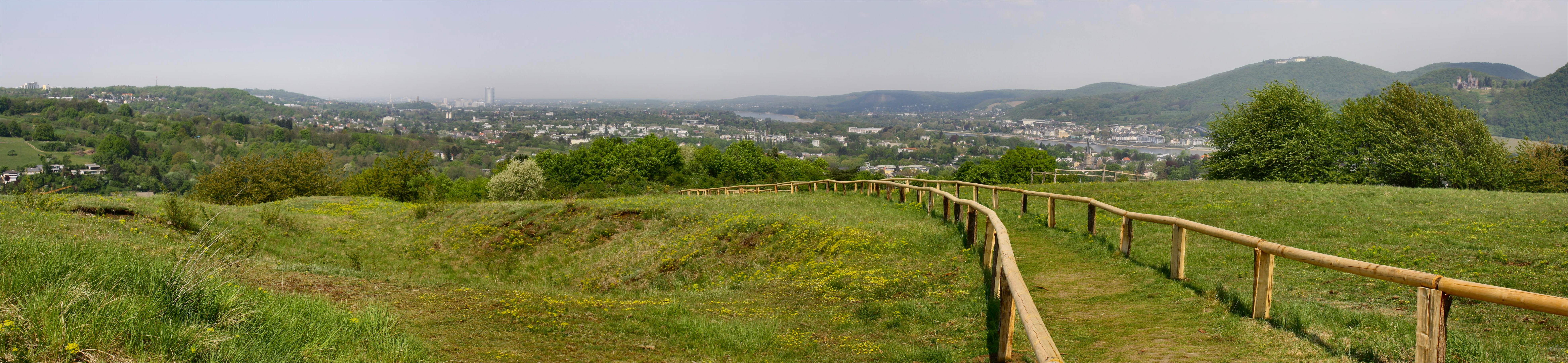 Blick vom Rodderberg nach Norden ins Rheintal